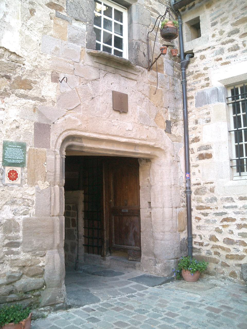 Passage entre place de la mairie et de l'eglise à Blesle